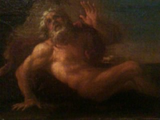 Particolare del "Giona sulla spiaggia di Ninive" di Giovanni Lorenzo Bertolotto. Conservato presso i depositi di Palazzo Bianco, Genova.